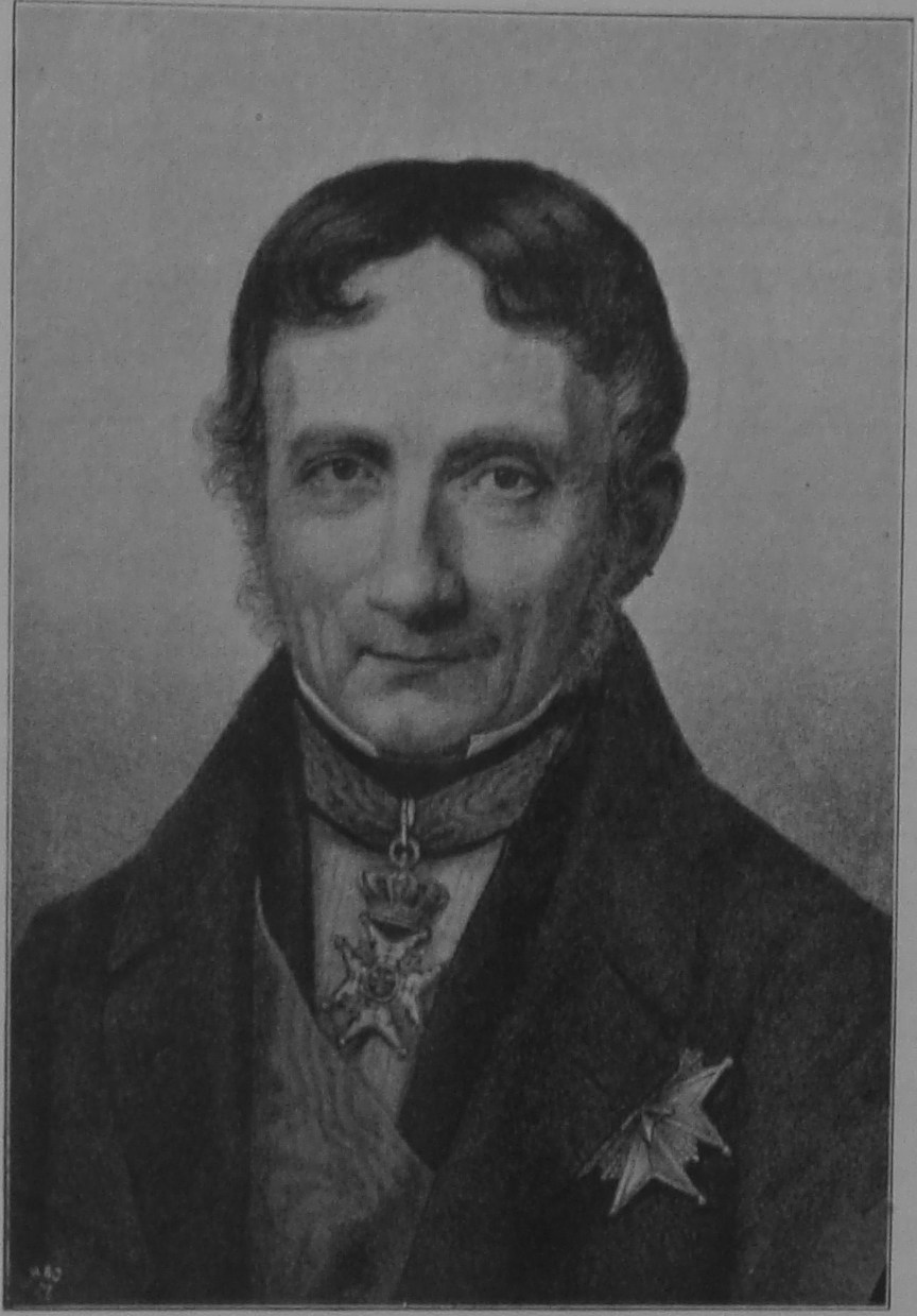 Den norske embetsmannen Paul Christian Holst (1776–1863).